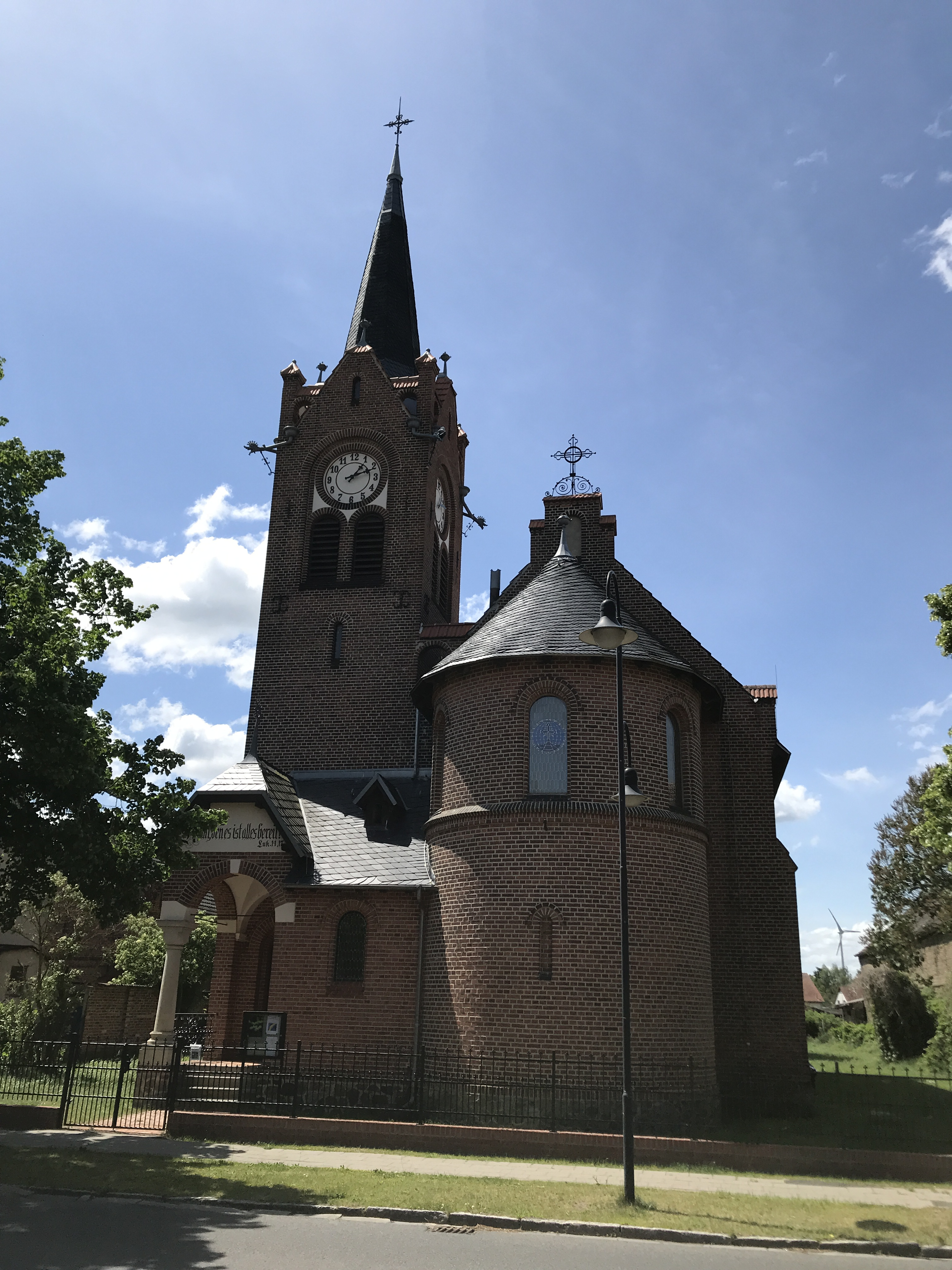 Die Dorfkirche Hoppenrade ist eine Backsteinkirche in der Hoppenrade, einem Ortsteil der Gemeinde Wustermark im Landkreis Havelland in Brandenburg. Im Innern steht unter anderem eine Lütkemüller-Orgel von 1895.